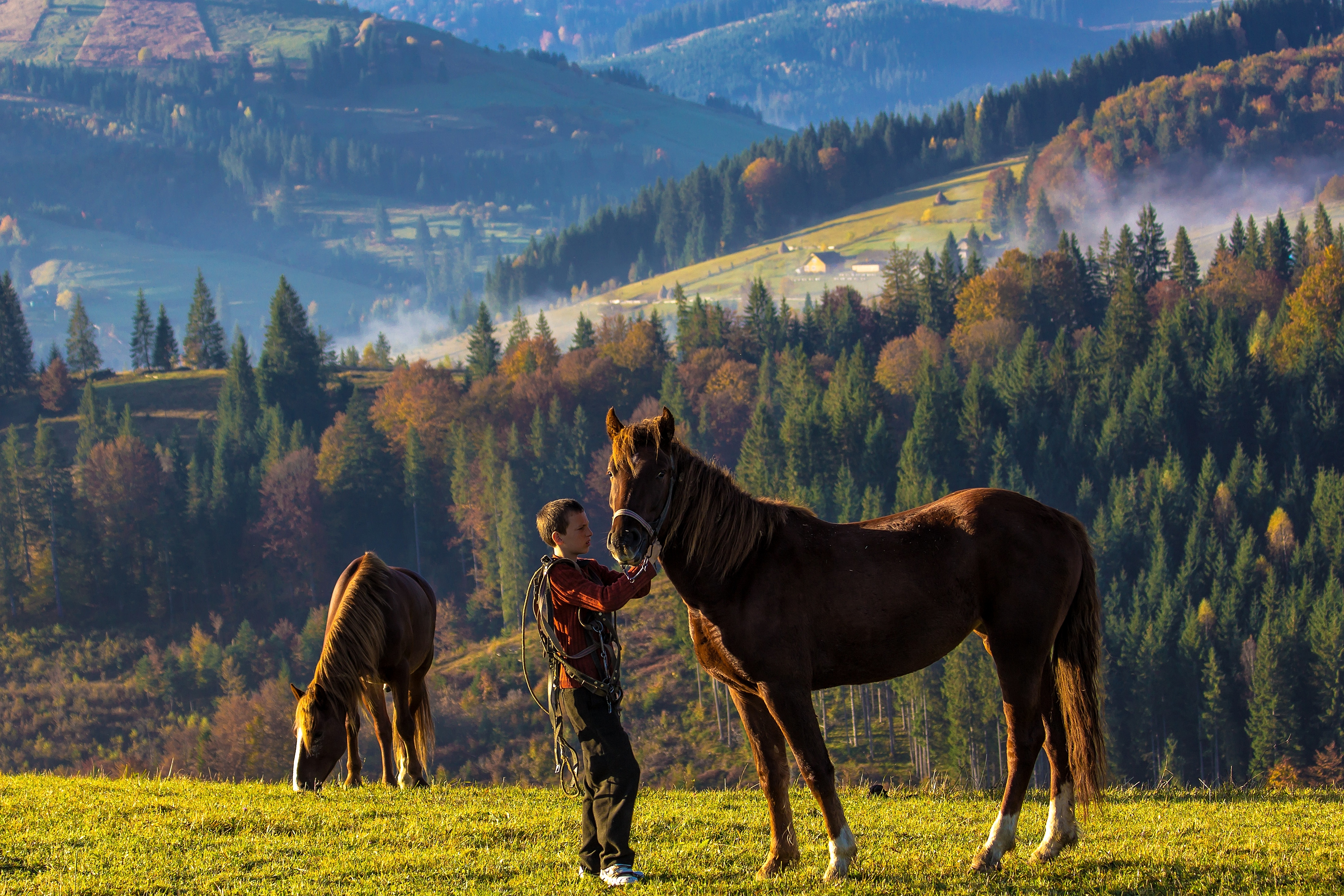 Черемоський, Путильський район